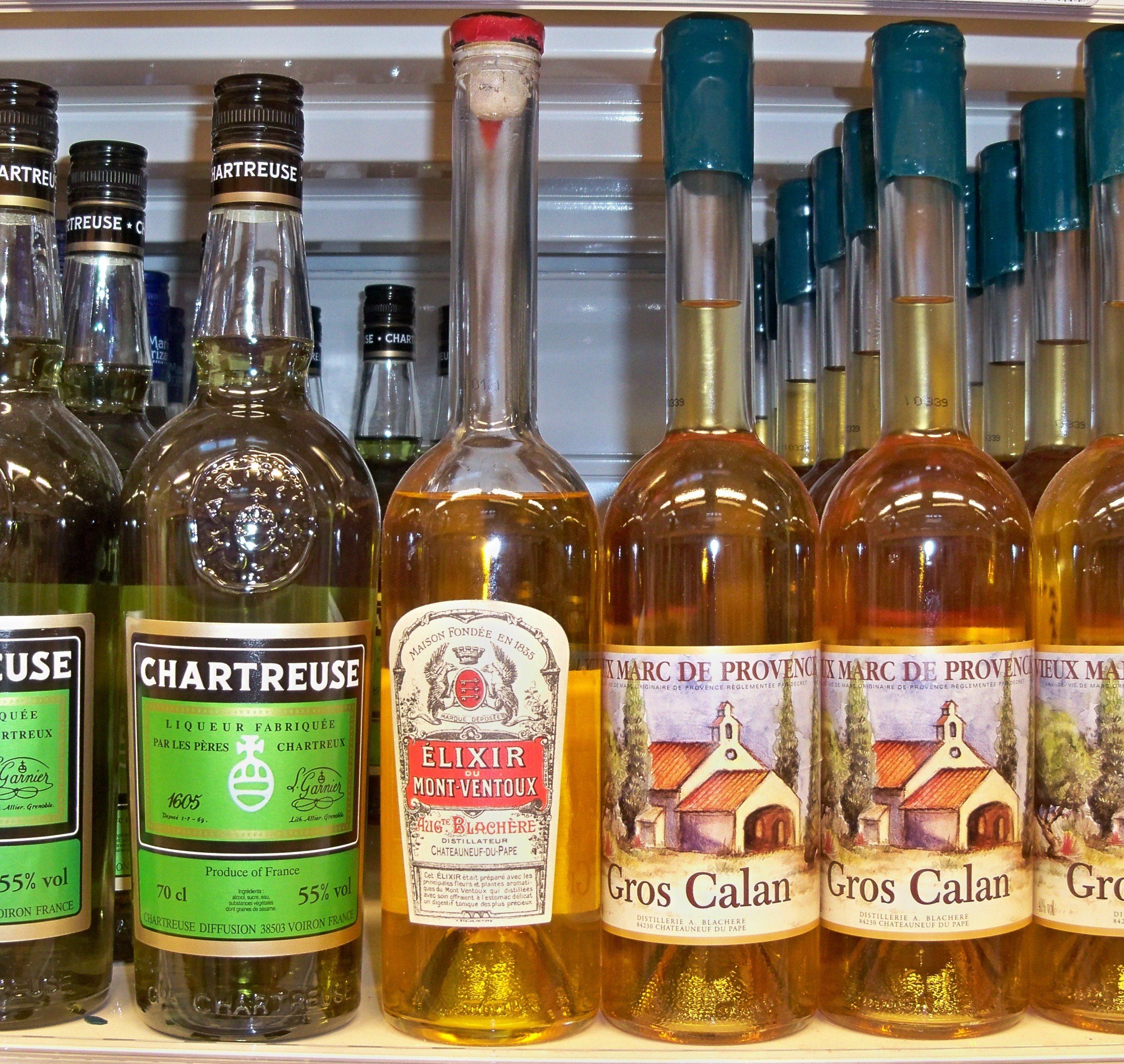 Elixir du Mont Ventoux, liqueur du Vaucluse (84)